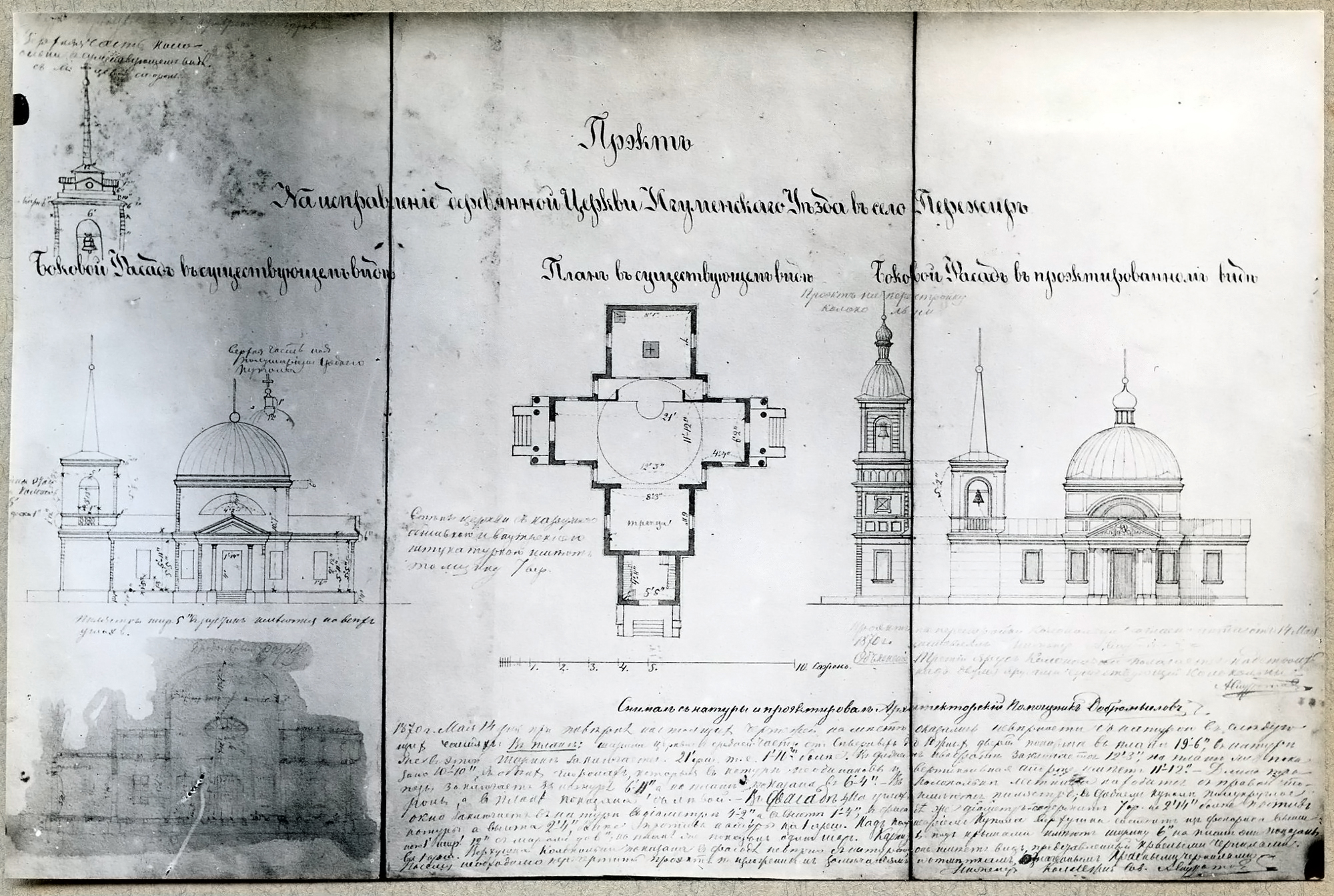 Беларуская (тарашкевіца): Пярэжыр (Piarežyr). Царква, праект маскоўскай перабудовы